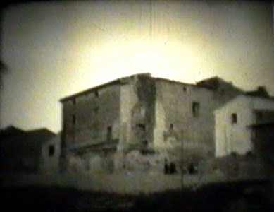 Benilloba - Vista antigua del Palacio de los Condes de Revillagigedo (Casa-fortaleza)